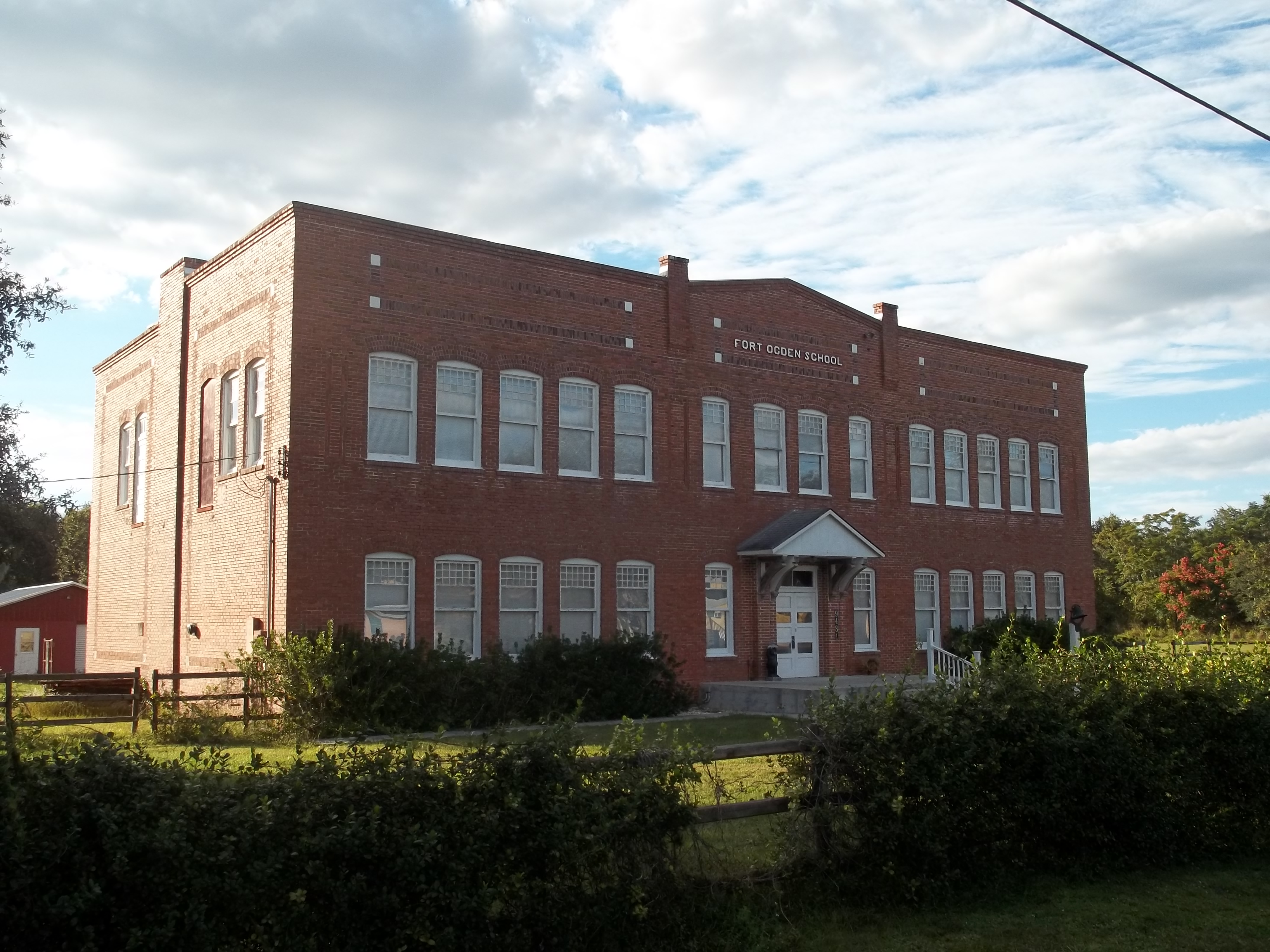 Fort Ogden, Florida: Old school